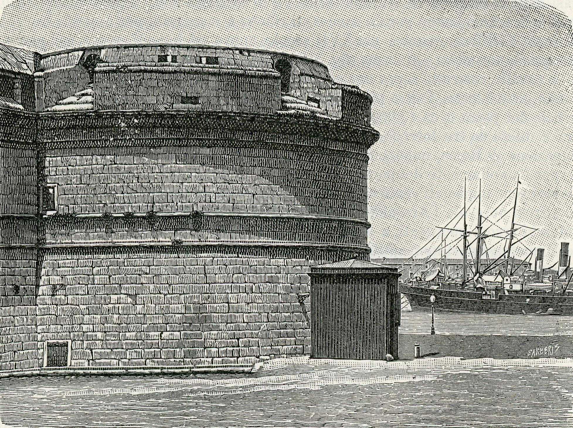 Civitavecchia: Forte di Michelangelo (xilografia).